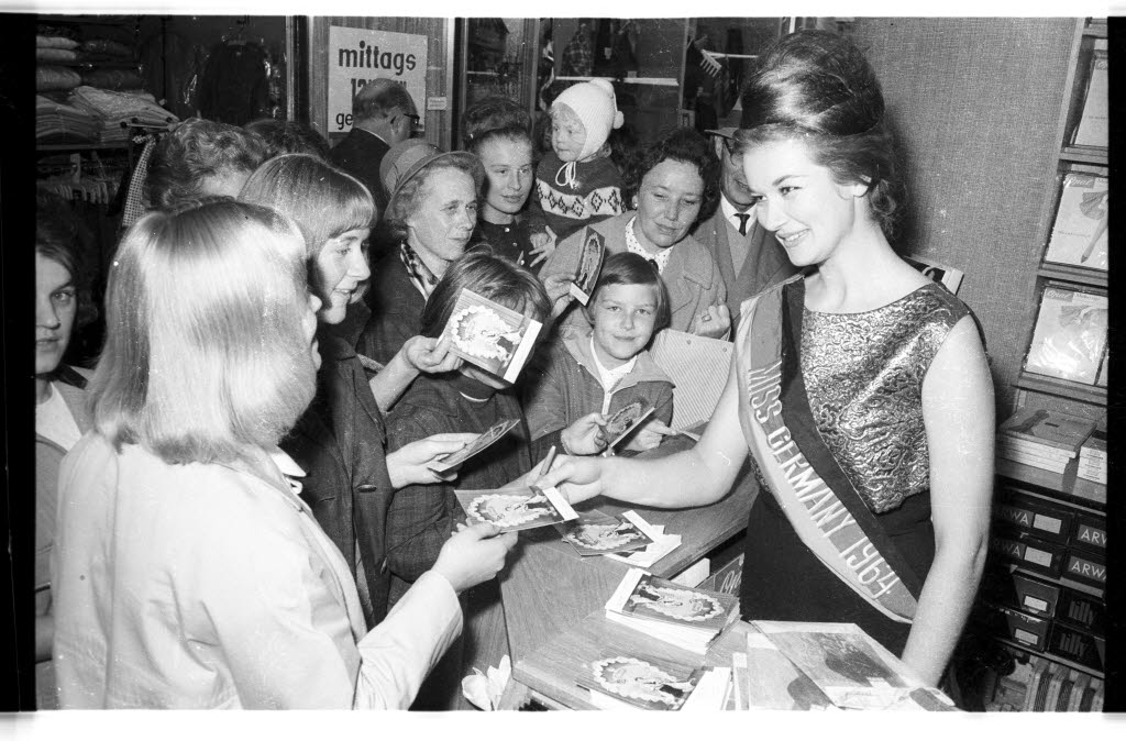 im Modehaus Goos am Sophienblatt 22-24.